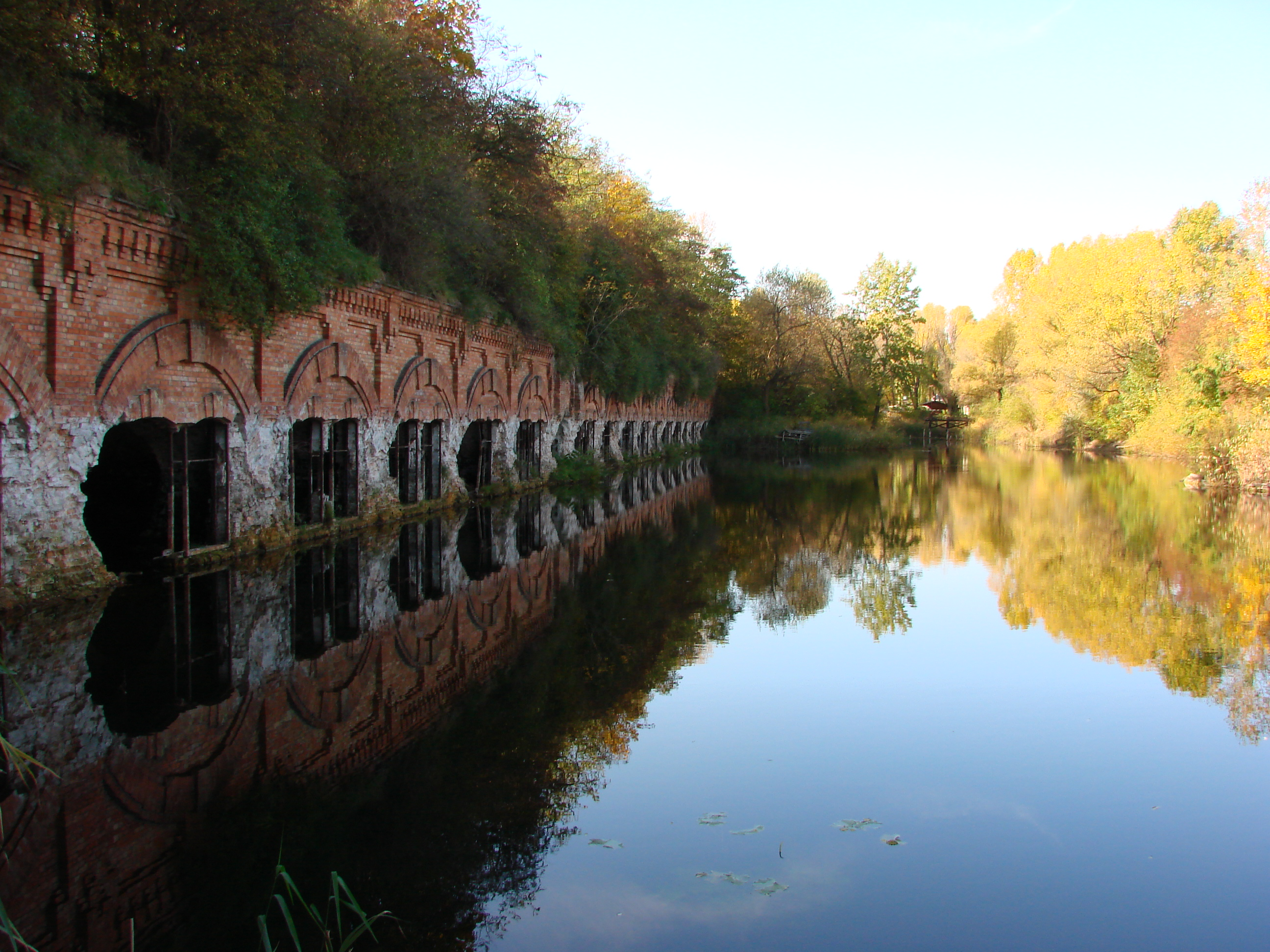 Fort Zbarż Warszawa okęcie Kirys666